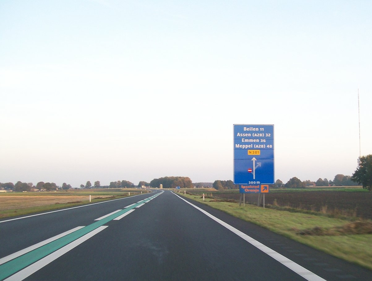 N381 bij Hoogersmilde